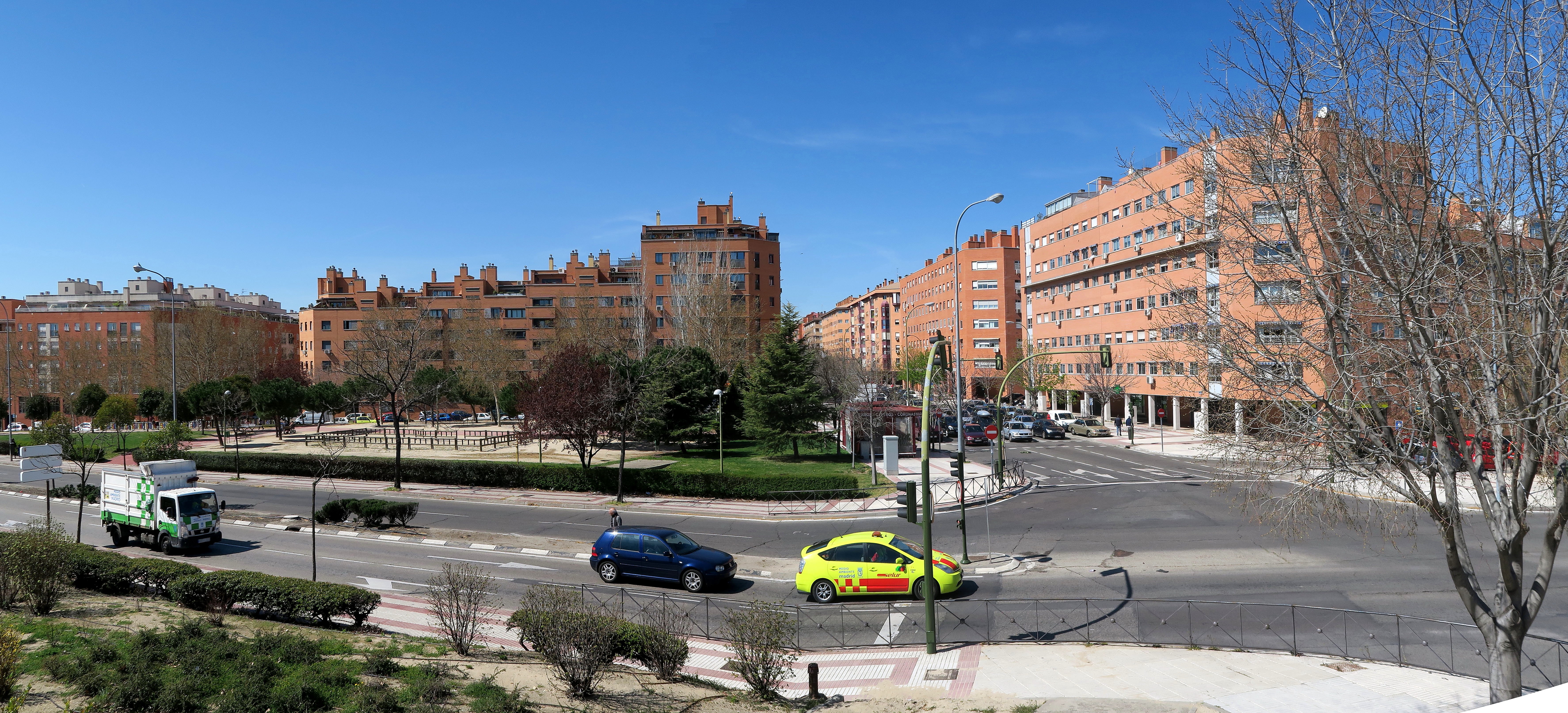 Arcos (Madrid), panorámica